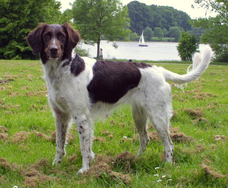 A Kleiner Munsterlander